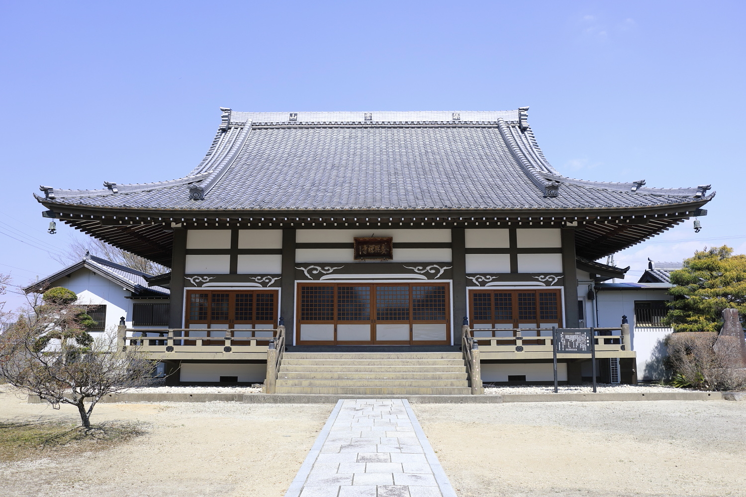 長興寺本堂（豊田市長興寺、2019年（平成31年）4月）